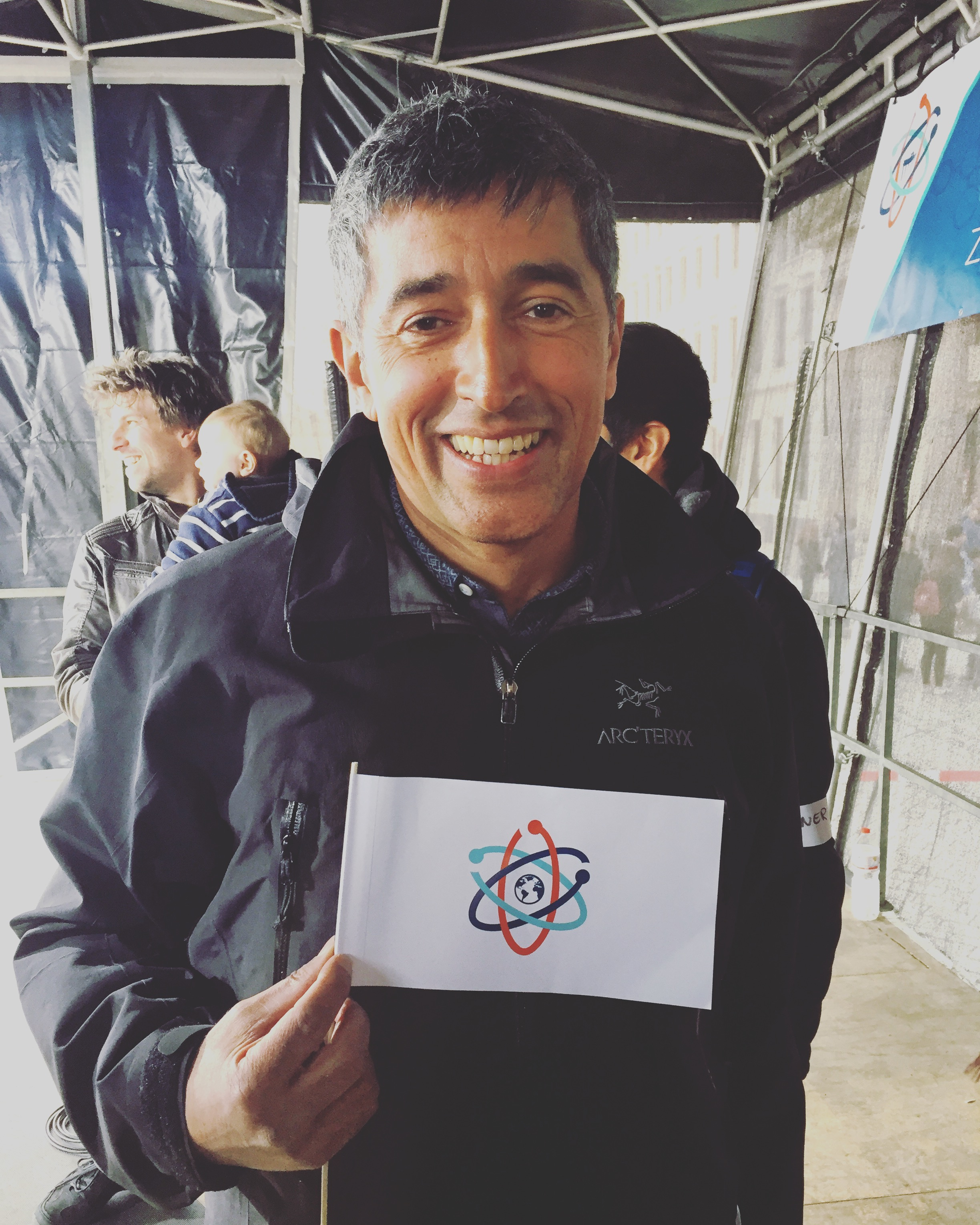 Foto: Maja Schubert, March for Science Berlin, Lizenz: CC-BY-4.0